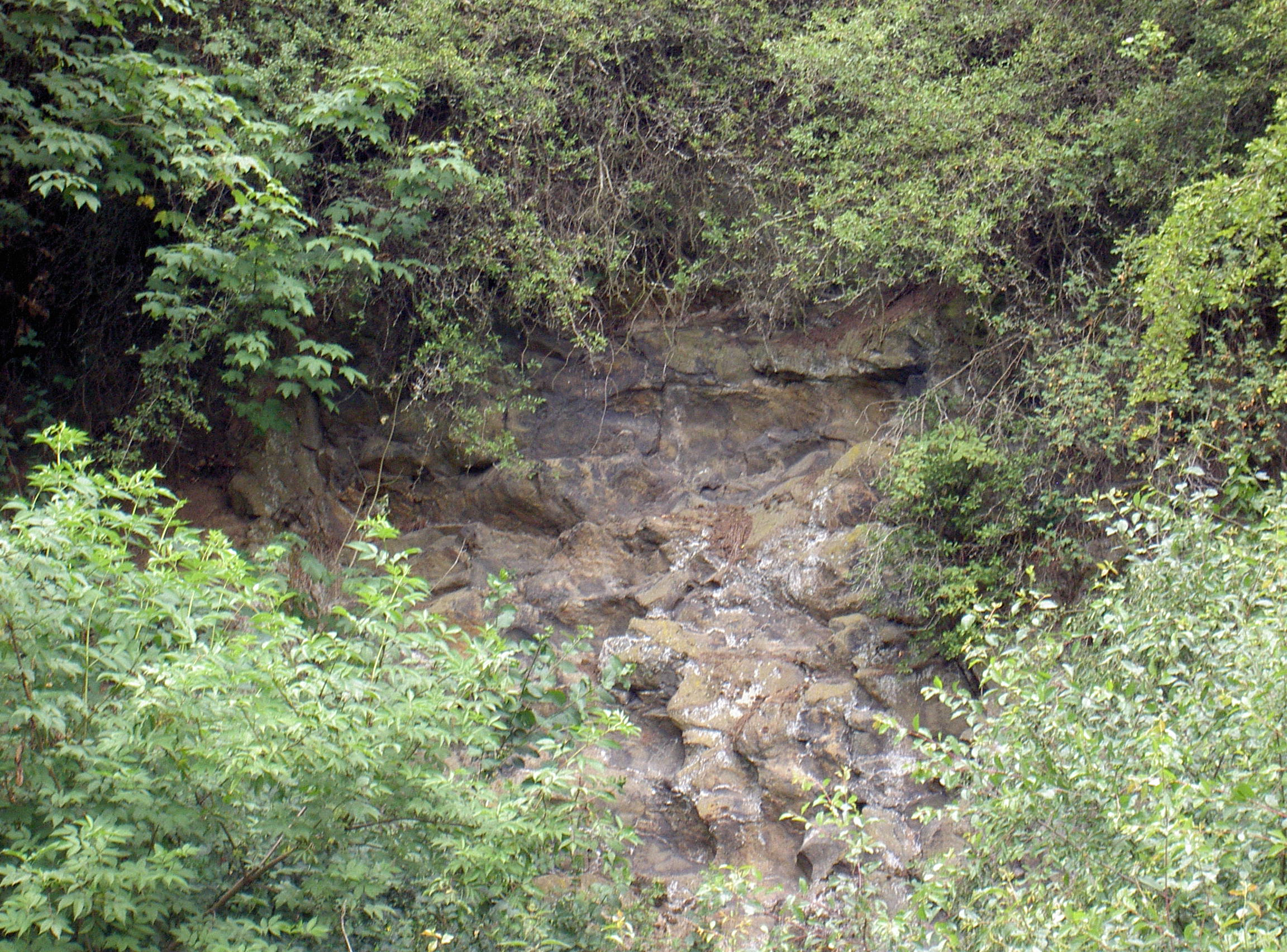 Teufelsberg in Hof (Saale)